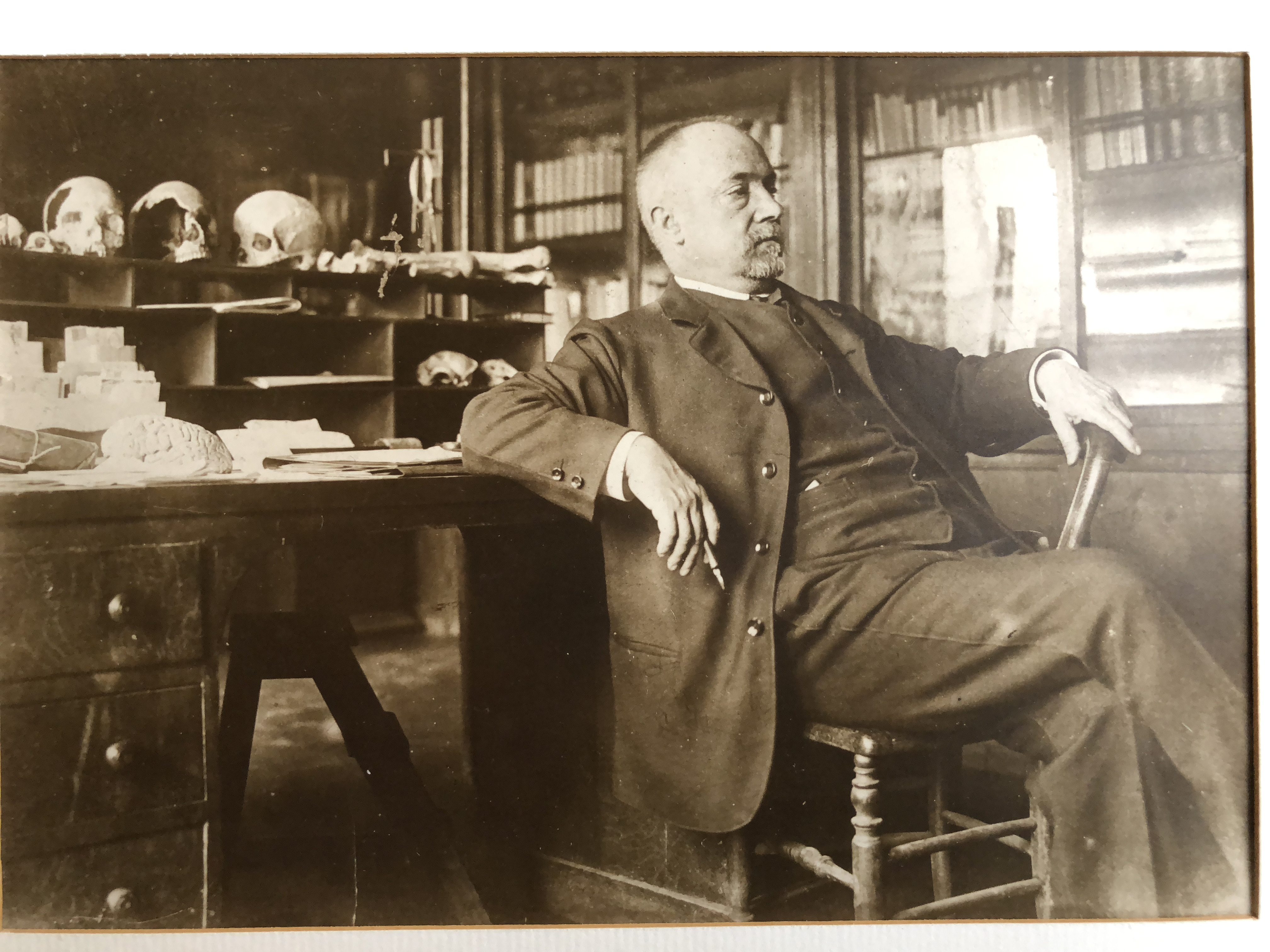 manouvrier